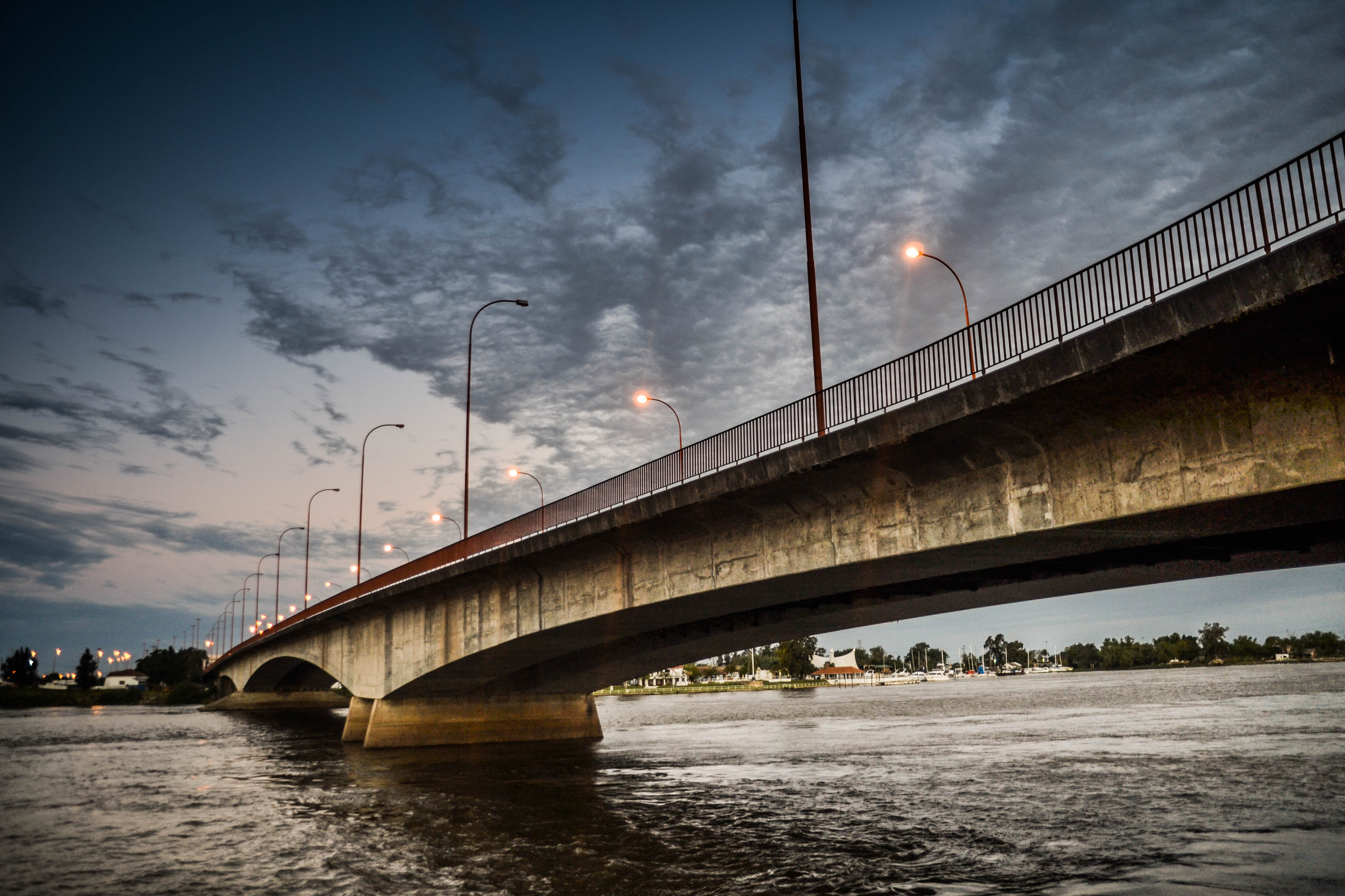 Puente Oroño de Santa Fe visto desde el oeste